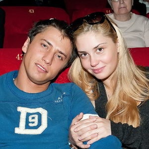 Актёр Павел Прилучный с актрисой Агатой Муцениеце на премьере фильма «Утомленные солнцем 2: ЦИТАДЕЛЬ» 3 мая 2011 года.